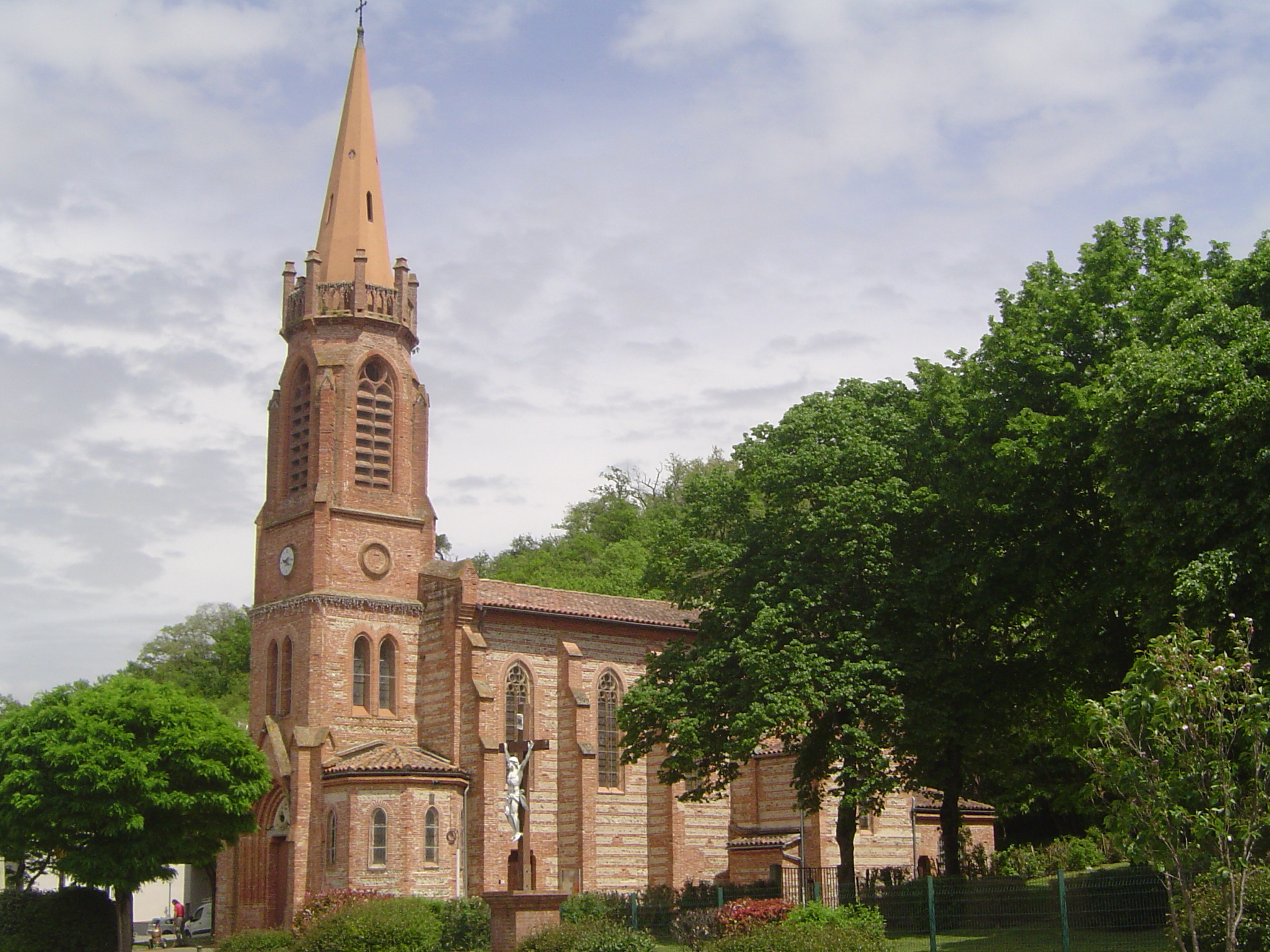 L'église Sainte-Christine de Lacroix-Falgarde (Haute-Garonne, France).